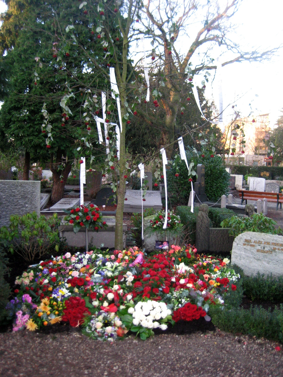 Het graf van Ramses Shaffy. Zorgvlied, Amsterdam.